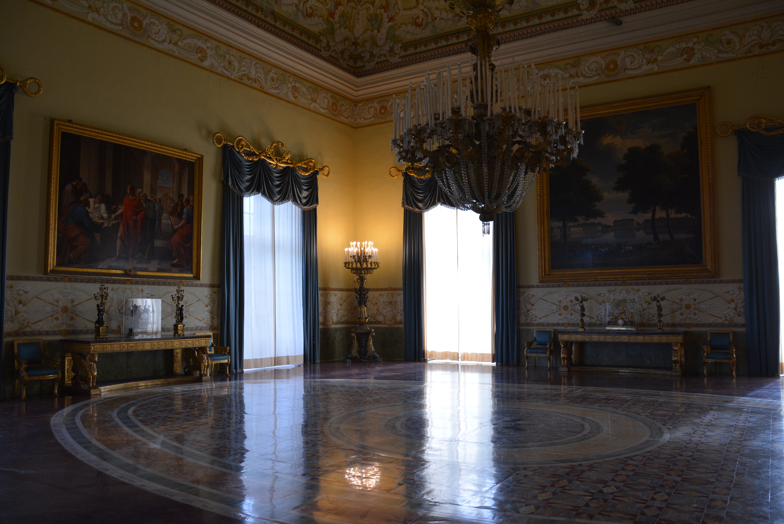 Salone dalla Culla